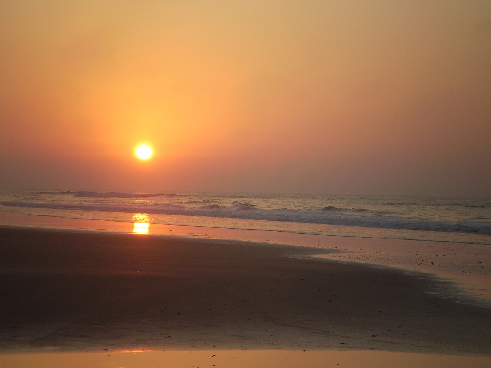 Nascer do Sol na tranquila praia do Hermenegildo